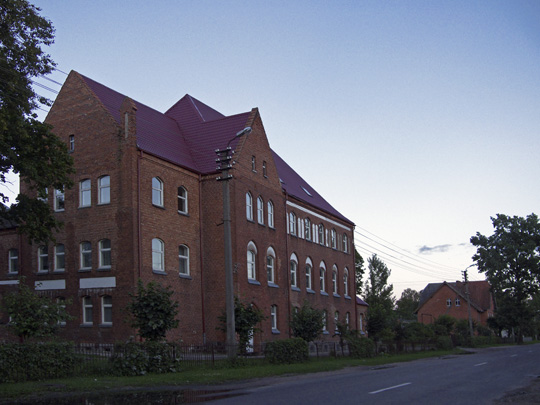 Viešvilės_Teismo_rūmai